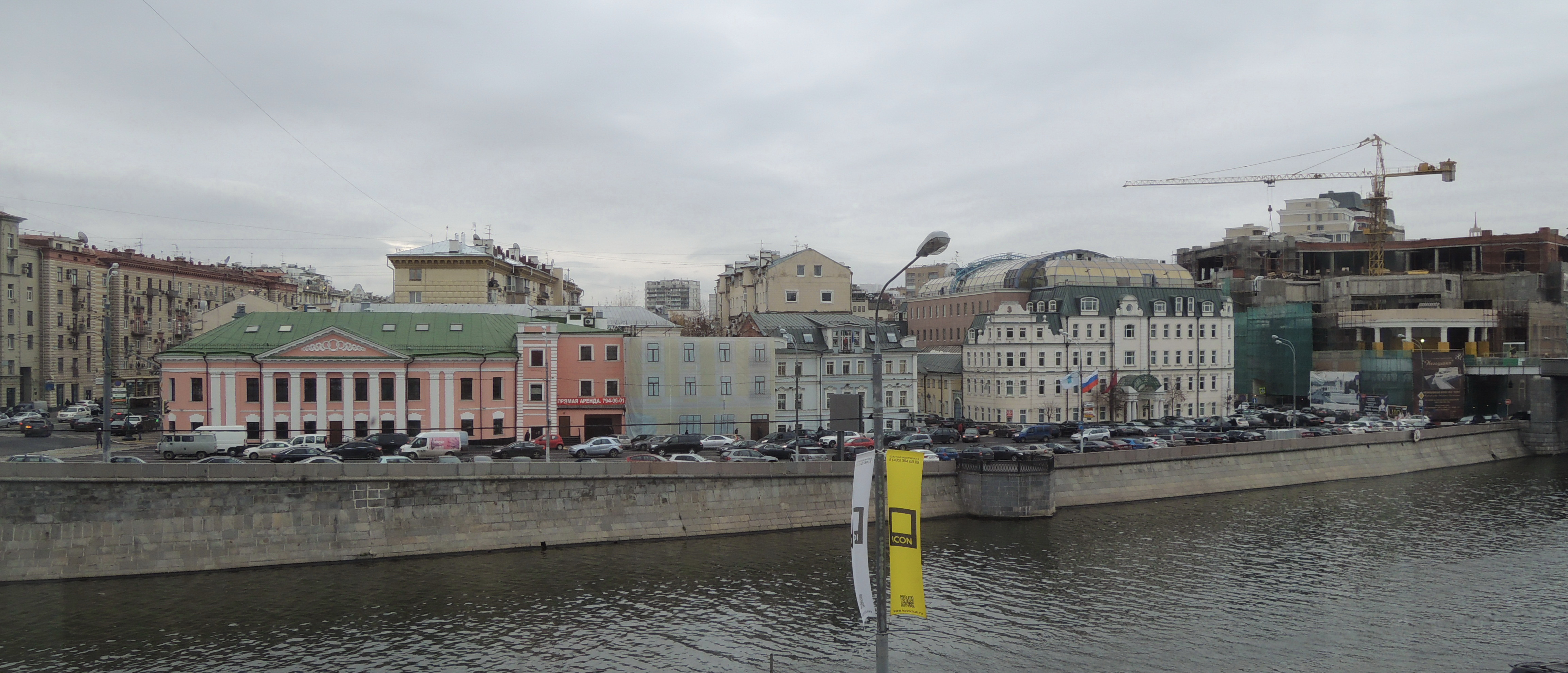 Якиманская набережная. Вид из окна Дома на Набережной